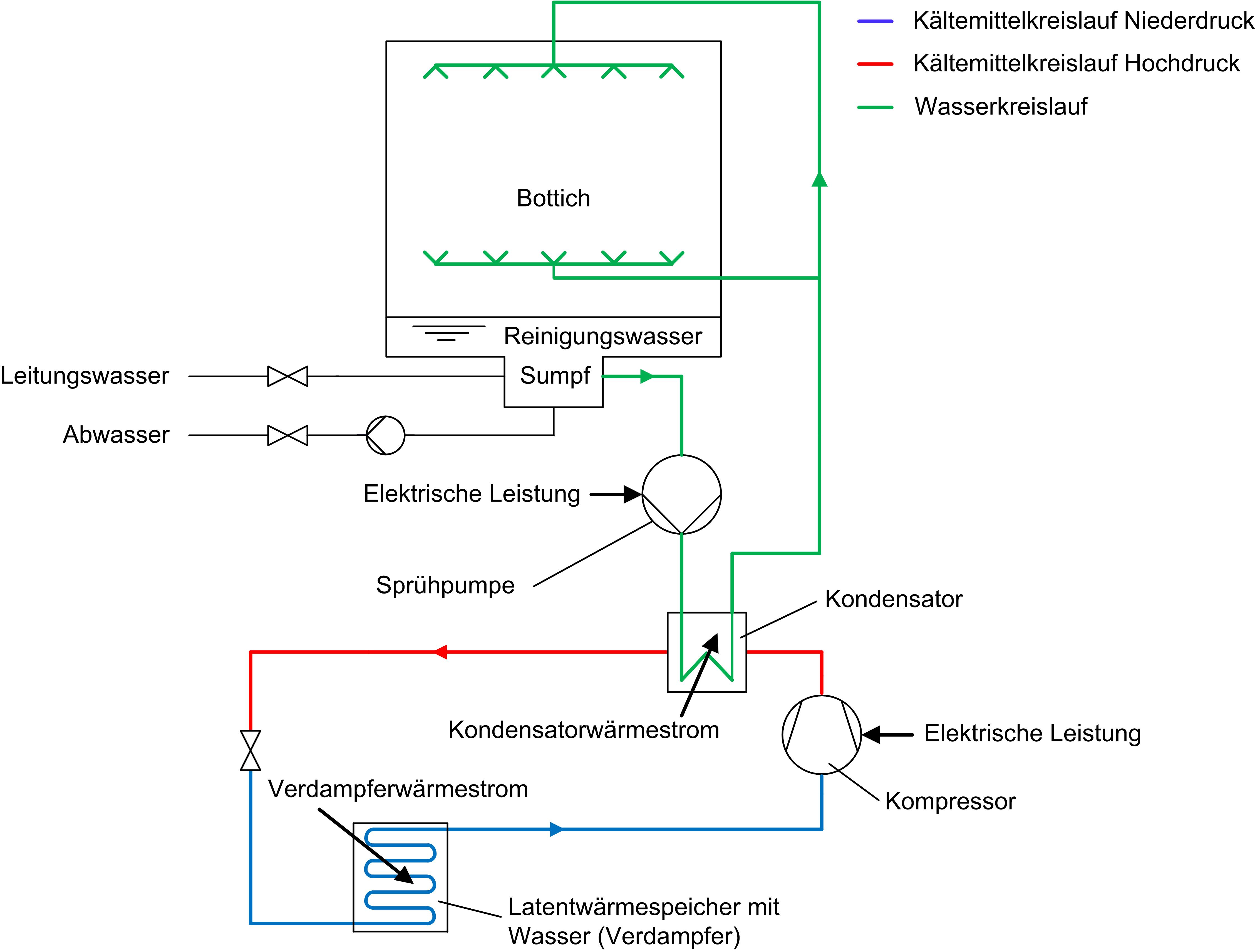 Schematische Darstellung eines Geschirrspülers mit Wärmepumpe